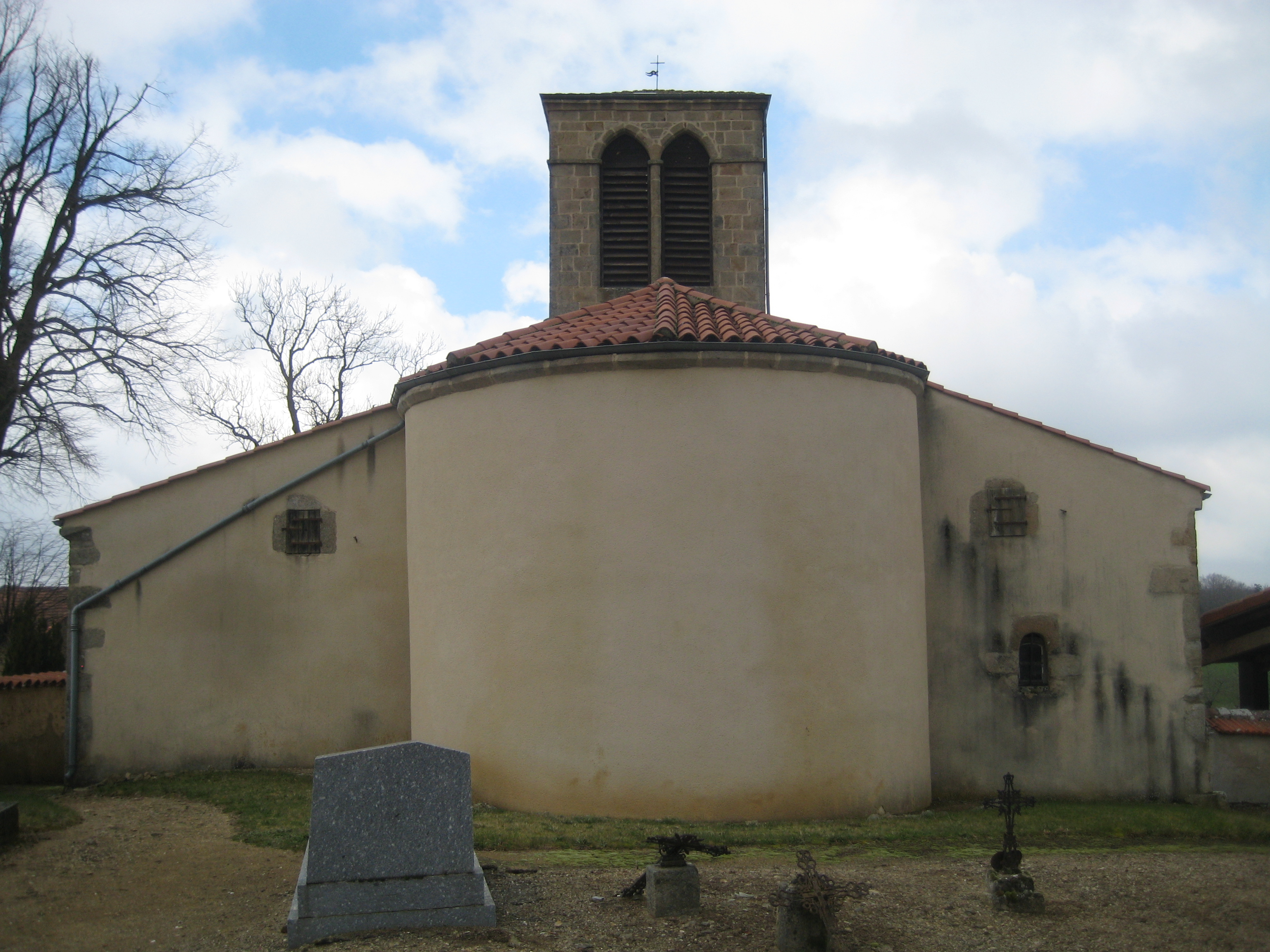 église de Peslières